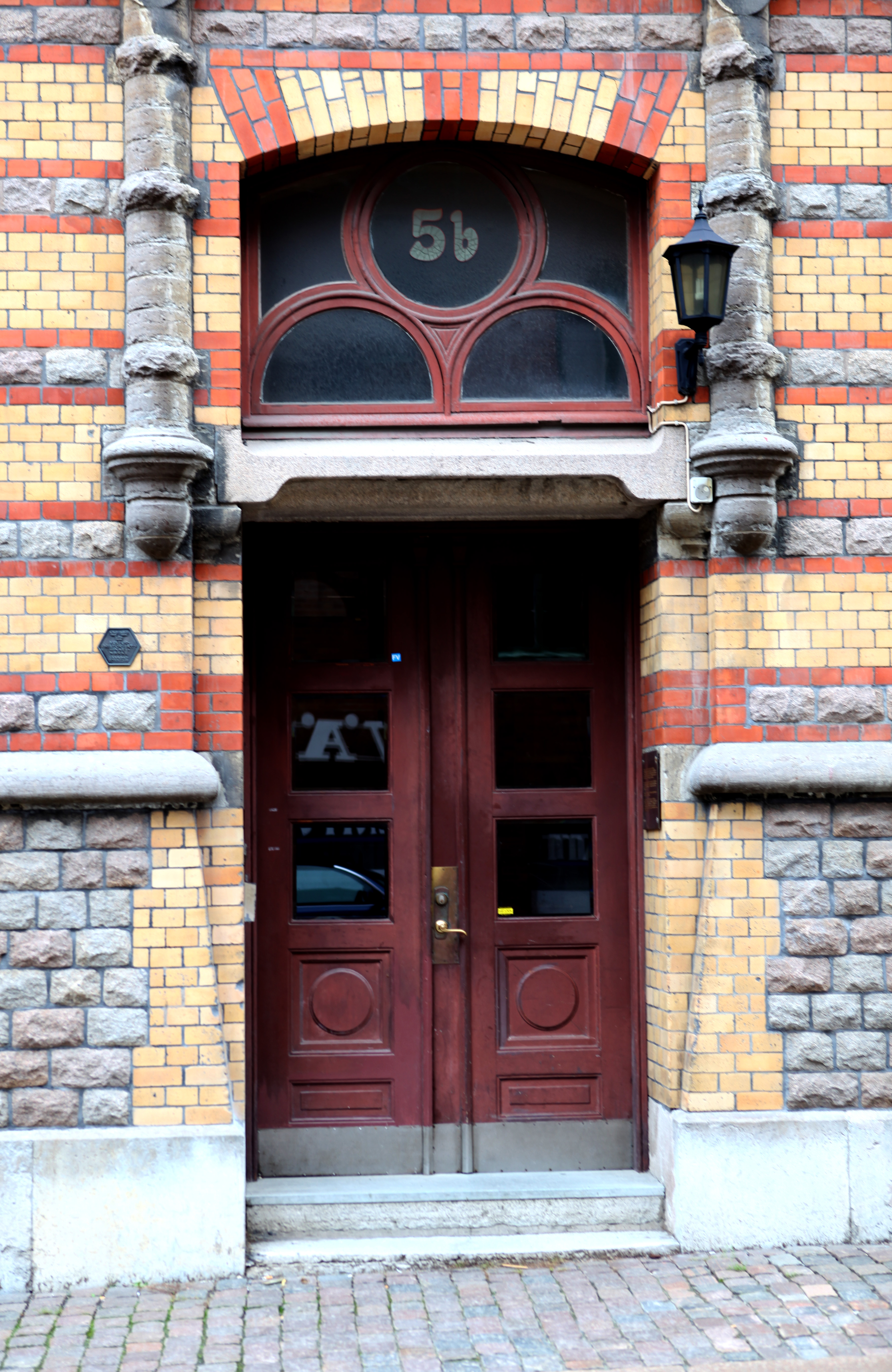 Porten på Majorsgatan 5B i Kvarteret Vaktposten i Göteborg.